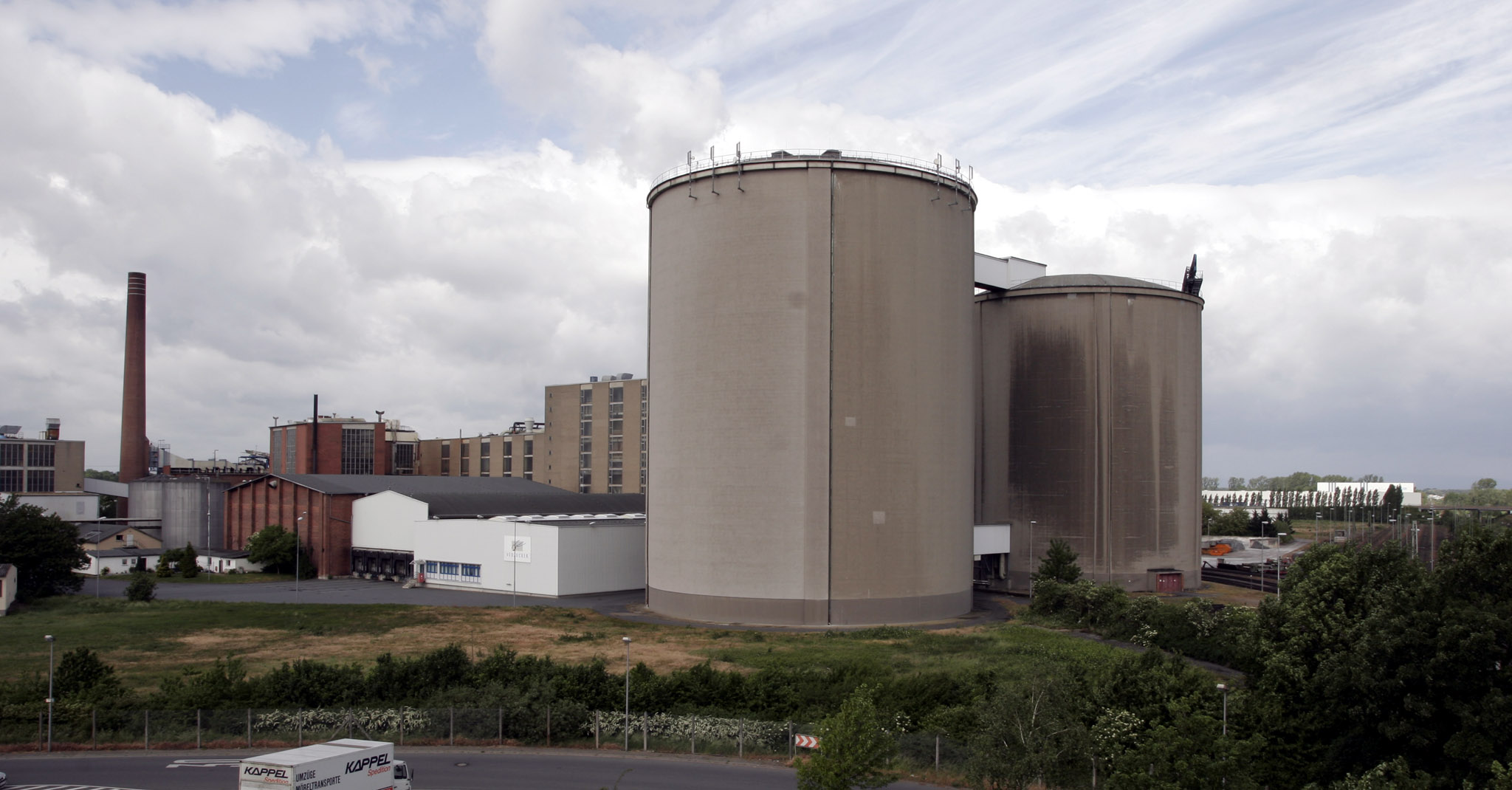 The Südzucker AG plant in Groß-Gerau, Hesse, Germany. This plant is shut down Das (inzwischen geschlossene) Werk der Südzucker AG in Groß-Gerau